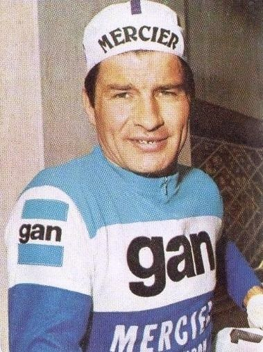 Raymond Poulidor (1973), 'Campioni dello Sport 1973 - 1974', Panini figurina n°139.